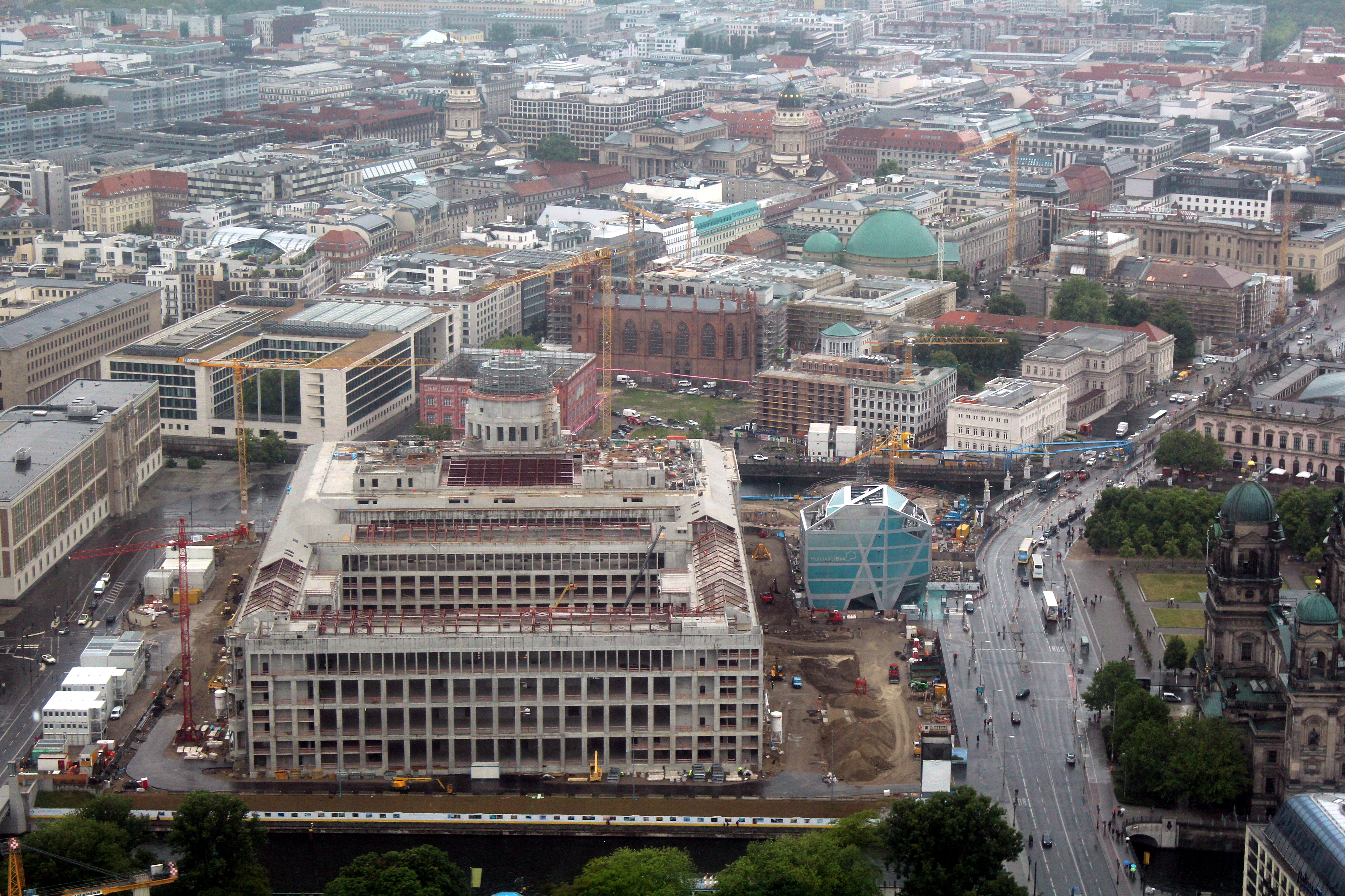 Berliner Stadtschloss, Juni 2015